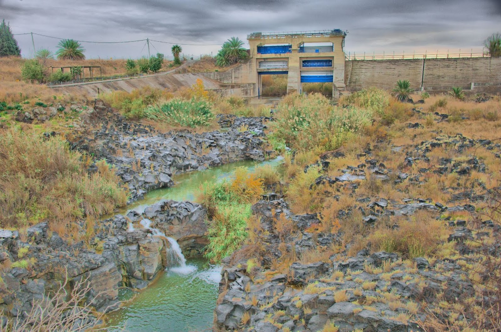 גשר הישנה ונהריים